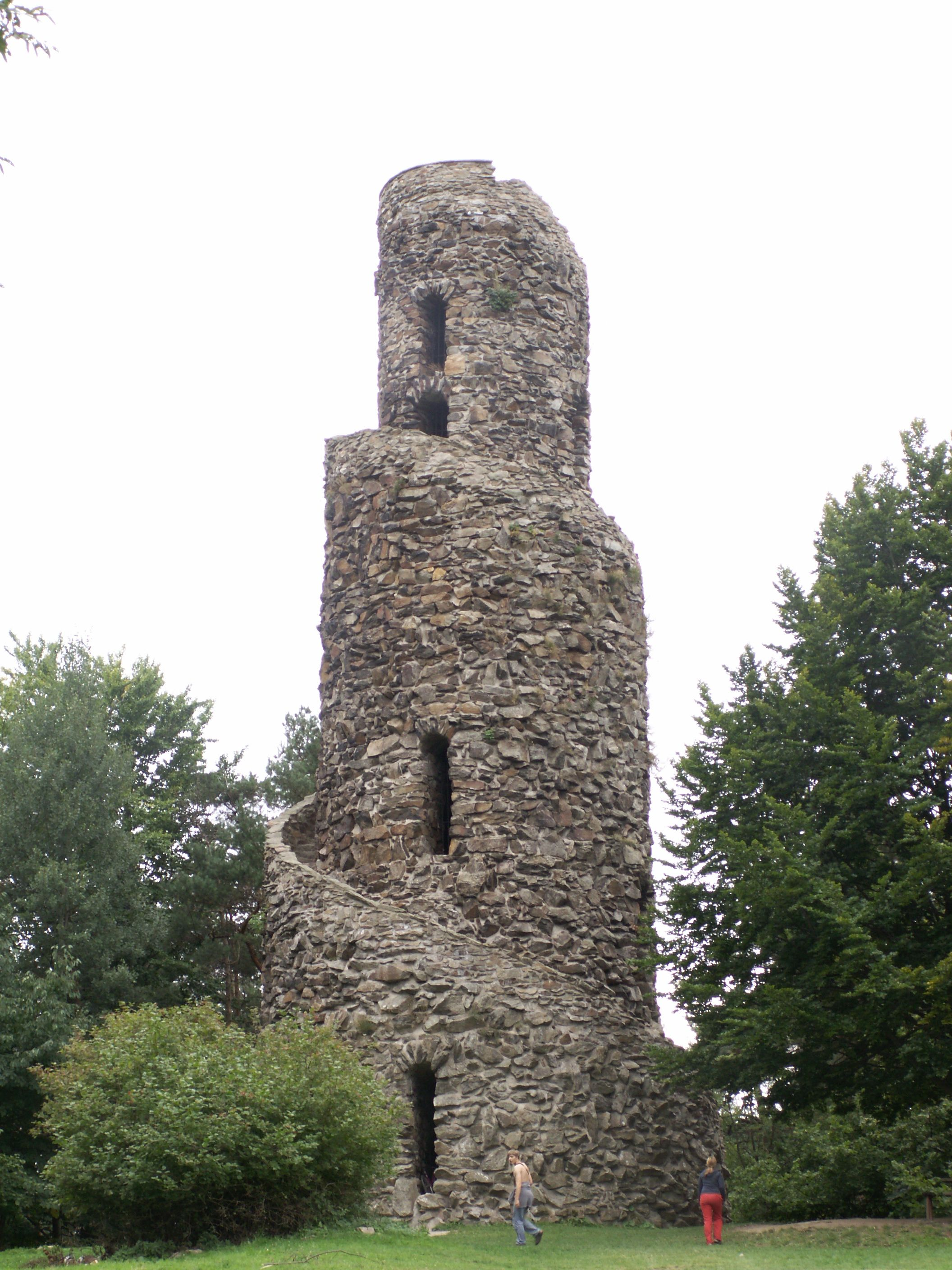 rozhledna Krásenský vrch v okrese Sokolov